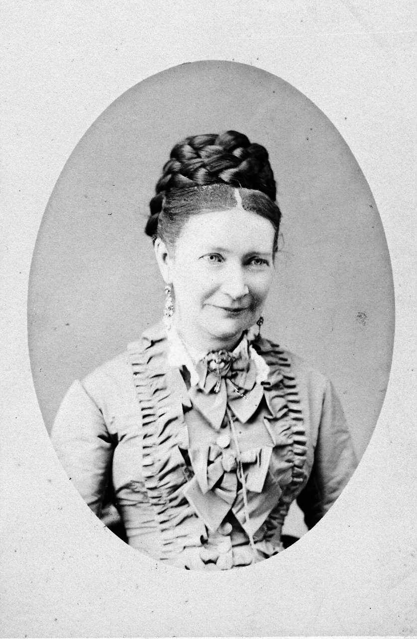 Ludmilla Assing (1821–1880), Frau mit geflochtenen Haaren. Brustbild. Auf Rückseite handschriftlercher Namenszug: "Ludmilla Assing". Fotografiert von Fratelli Alinari, Copyright, Dichter- und Stadtmuseum Liestal, Inventarnummer, DIST 000004456 Lizenzbedingungen CC BY-NC-SA 4.0)